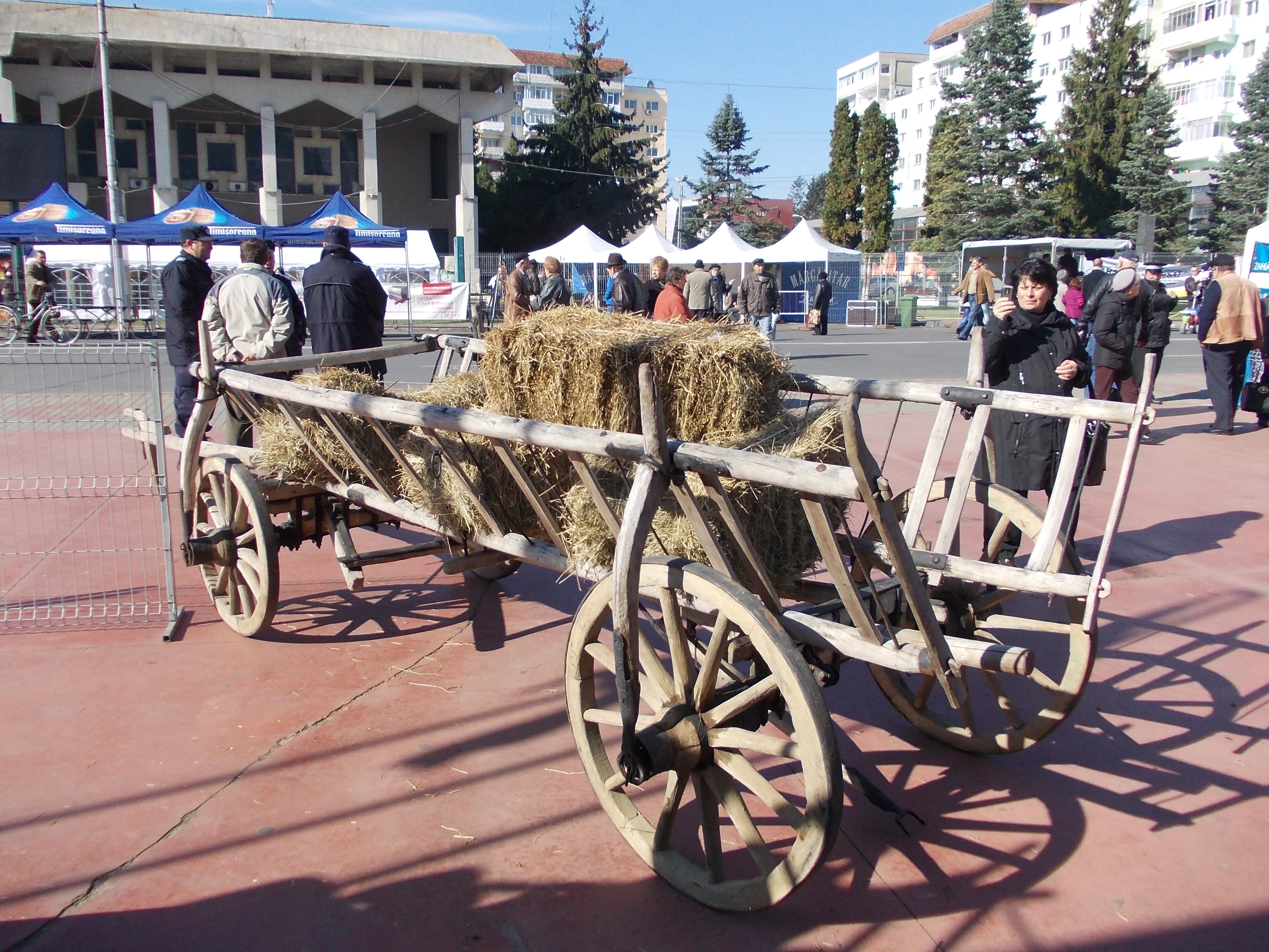 Căruță cu paie în orașul Roman, România. În spate se vede Casa de Cultură a Sindicatelor din Roman.